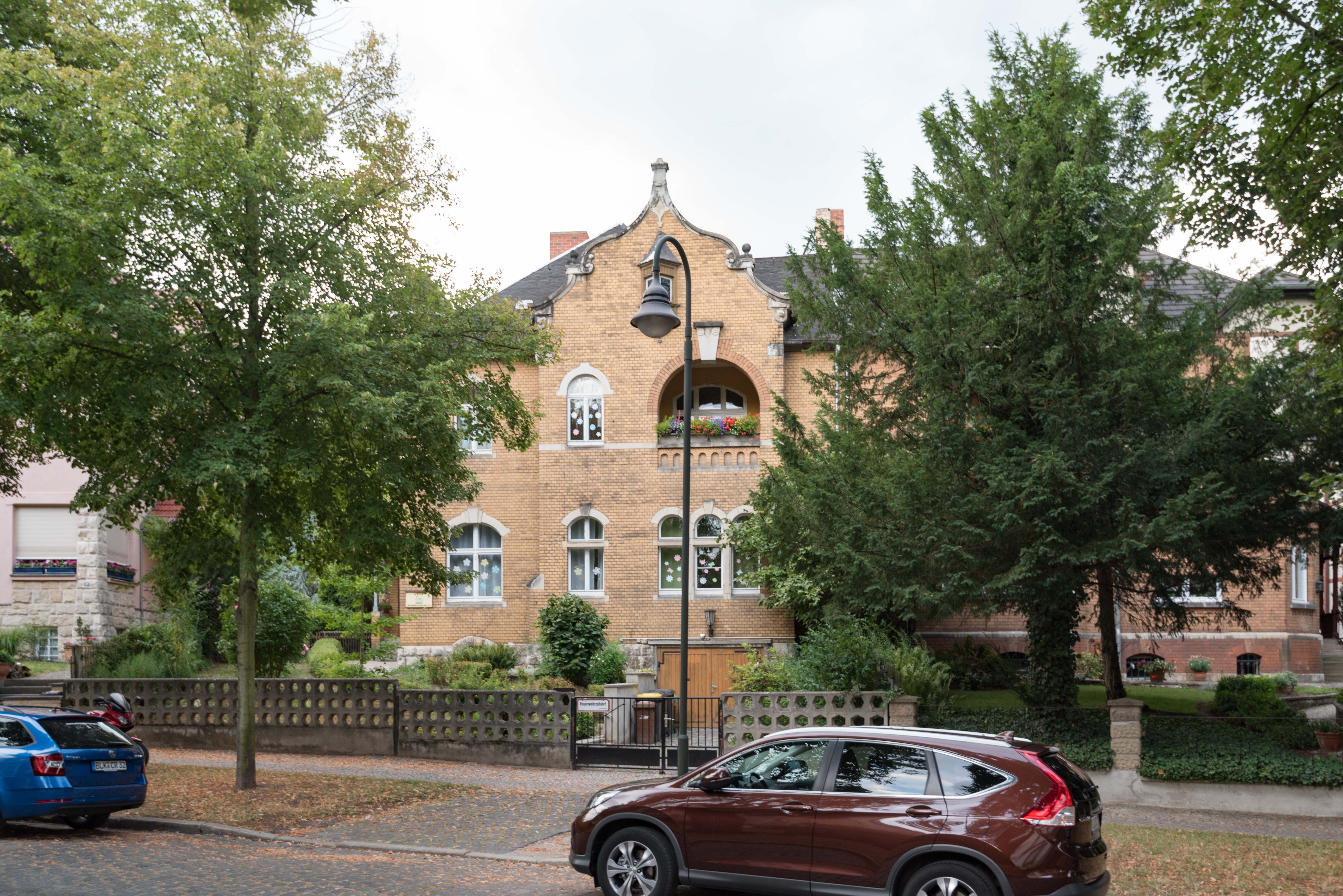 Naumburg (Saale), Buchholzstraße 33